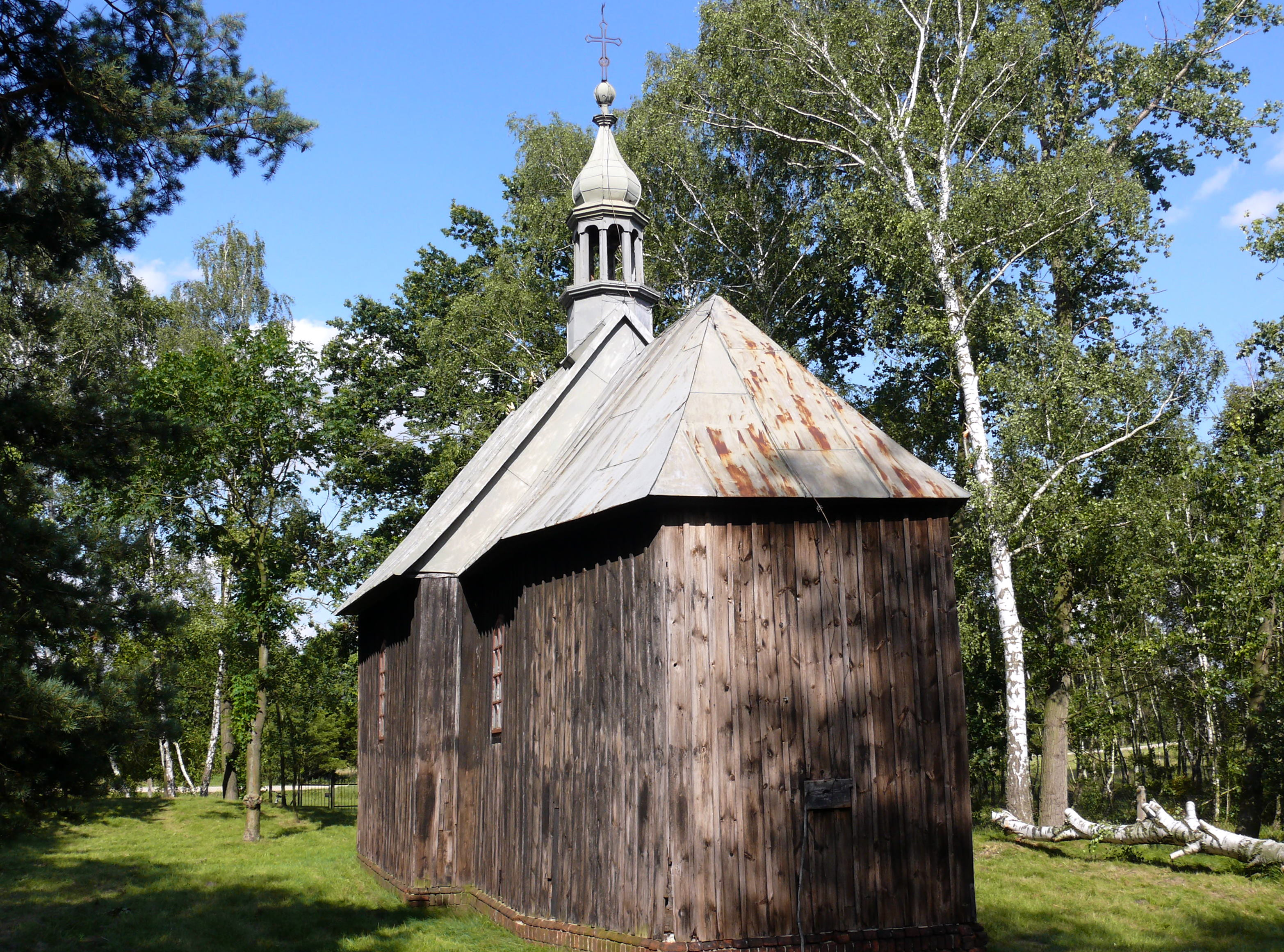 Kaplica Błogosławionego Bogumiła w DObrowie